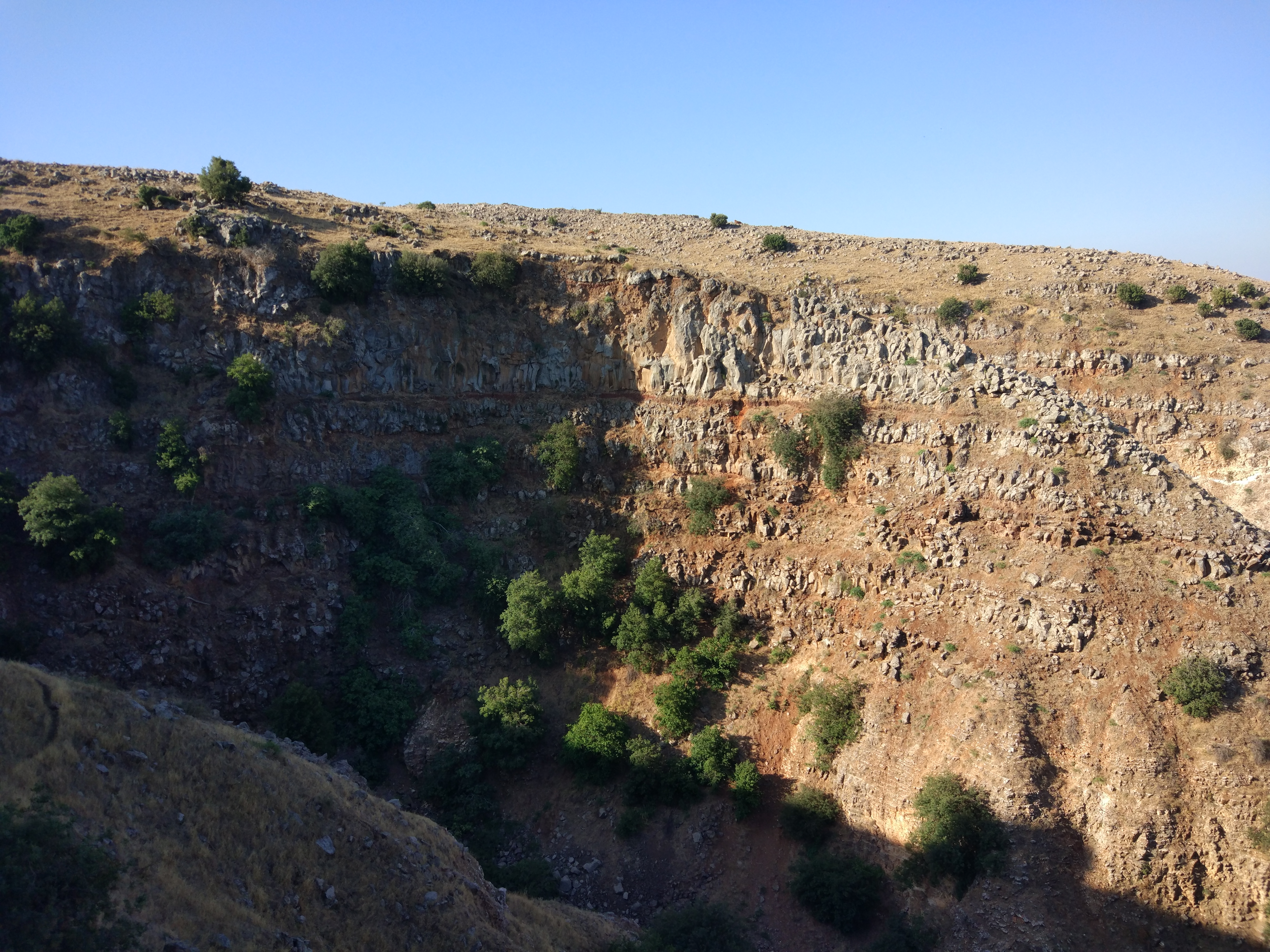 סדרה של סלעי בזלת מיחידת קילוחי יהודיה-דלווה בנחל עורבים שברמת הגולן. ניתן לראות את שכבות עמודי הבזלת המופרדים באמצעות שכבה דקה של פליאוסול אדמדם שנוצר בתקופה שבין קילוח לקילוח